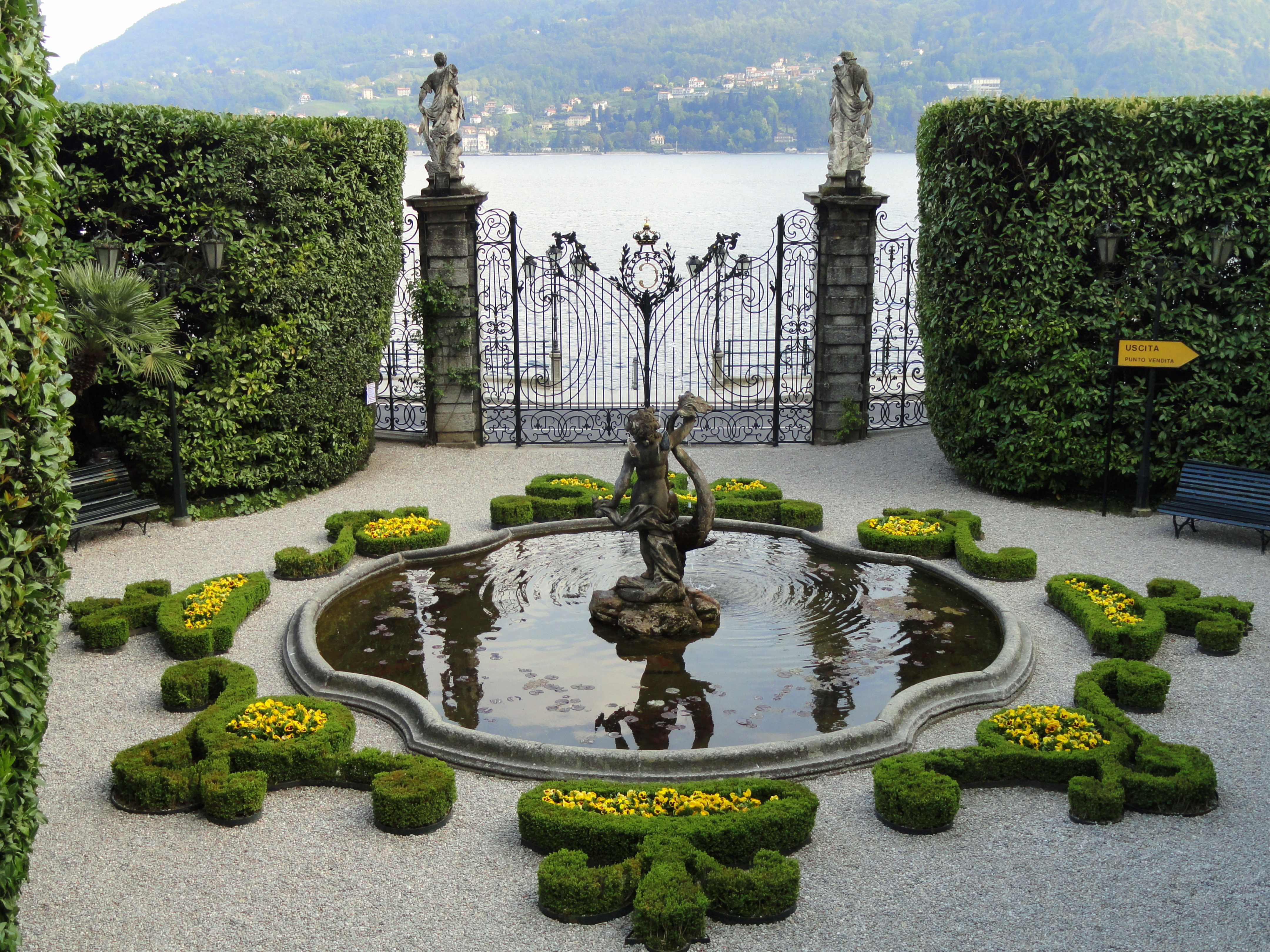 Villa Carlotta (Tremezzo), on Lake Como, Italy.